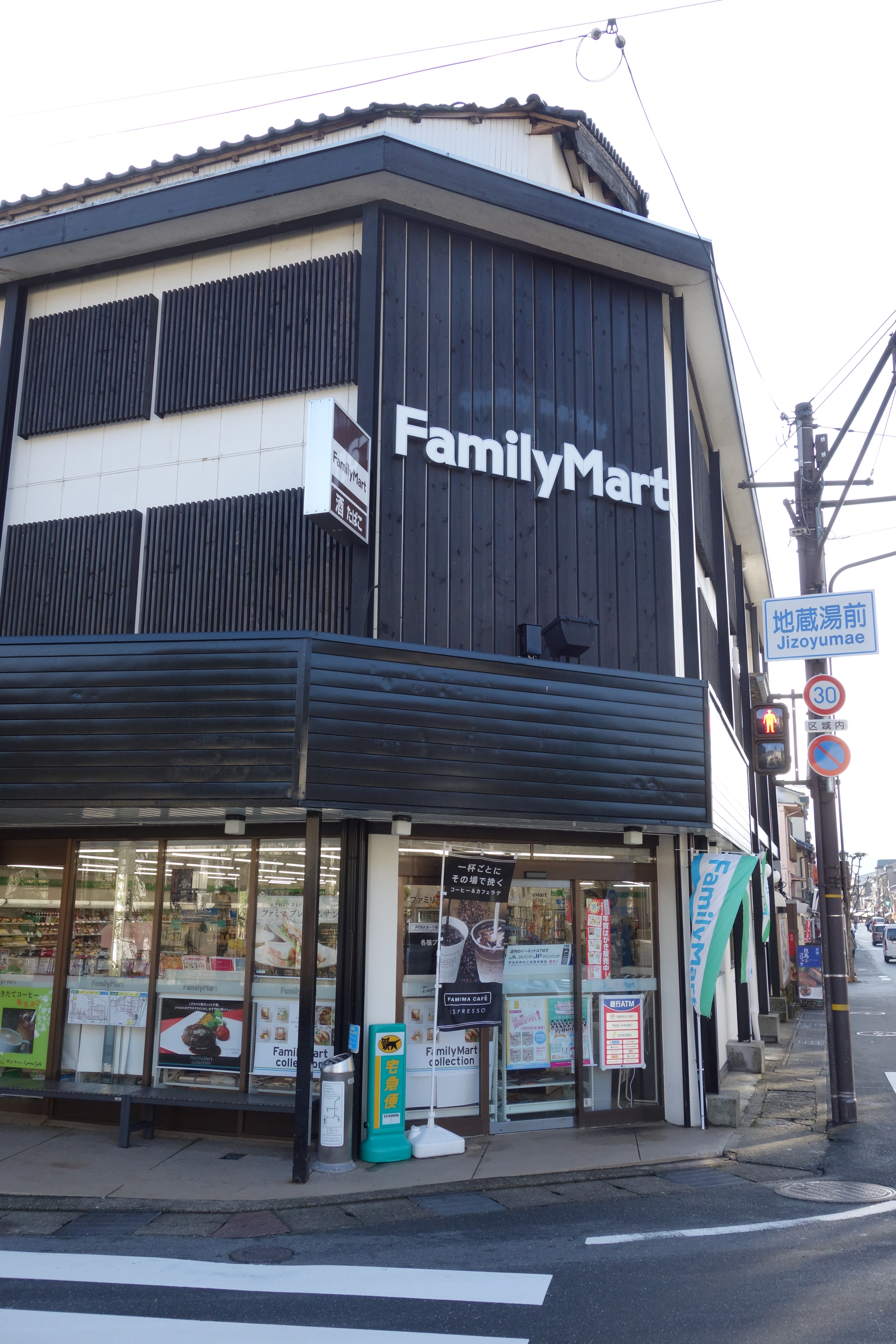 ファミリーマート城崎温泉店 （兵庫県豊岡市城崎町湯島）